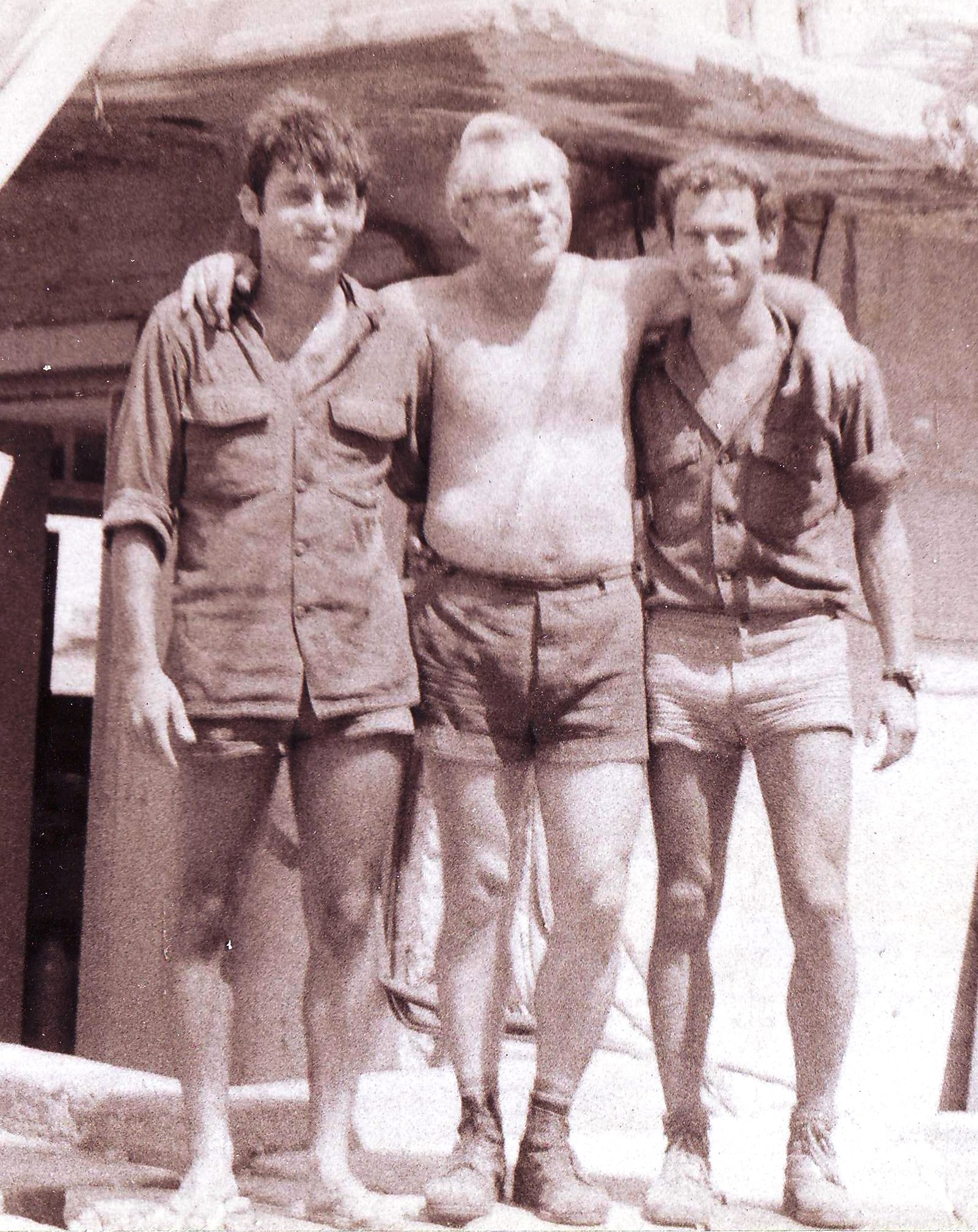 האזרח ריינר עם לוחמים בסיני